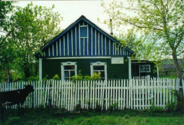 Description: Das Bild stellt das Bethaus der evangelisch-lutherischen Gemeinde im Dorf Klaus in der Oblast Omsk dar, und zwar im Sommer des Jahres 2001. Source: Eigene Arbeit. Date: Erstellt wurde das Foto 2001, erstmals erschienen ist es 2006 unter: Permission: Creative Commons Attribution ShareAlike 2.5 Author: Der Fotograf bin ich.